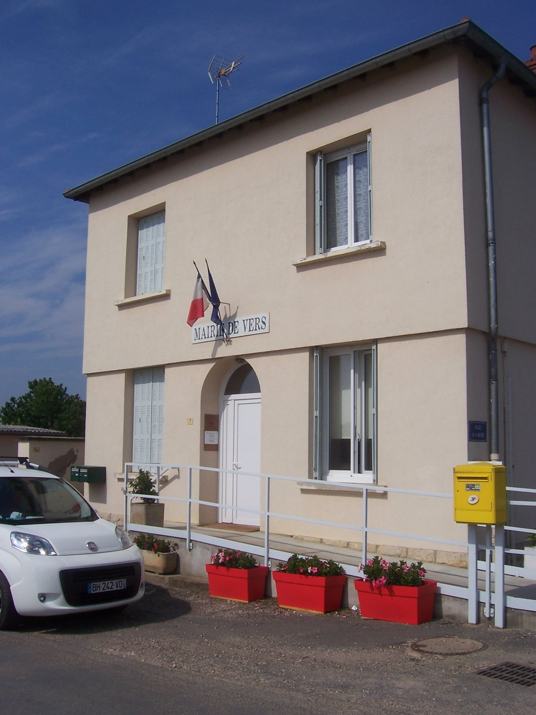 Mairie de Vers